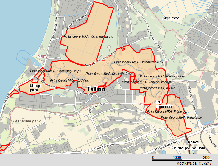 Pirita jõeoru MKA paiknemine kaardil. Põhineb Maa-ameti kaardil.